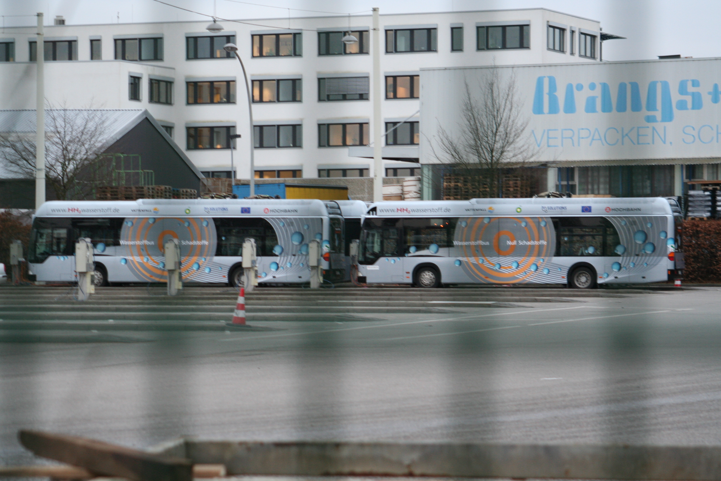 Citaro Brennstoffzellenbus der Hochbahn in Hamburg (Hy-FLEET:CUTE-Lackierung)